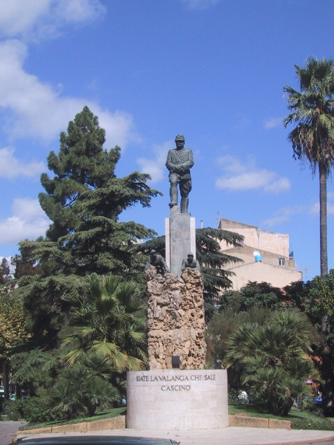 Gemaakt door Piazza